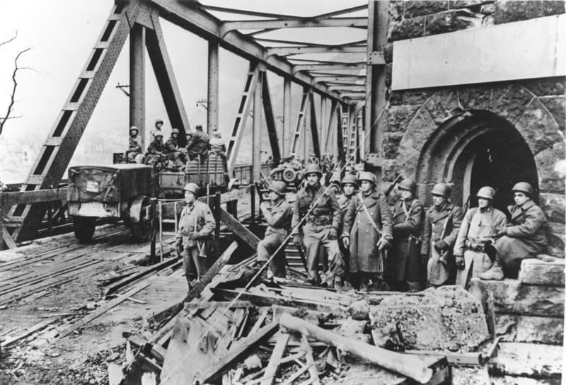 Remagen, beschädigte Brücke Brücke von Remagen, zwischen 8.3. und 10.3.1945